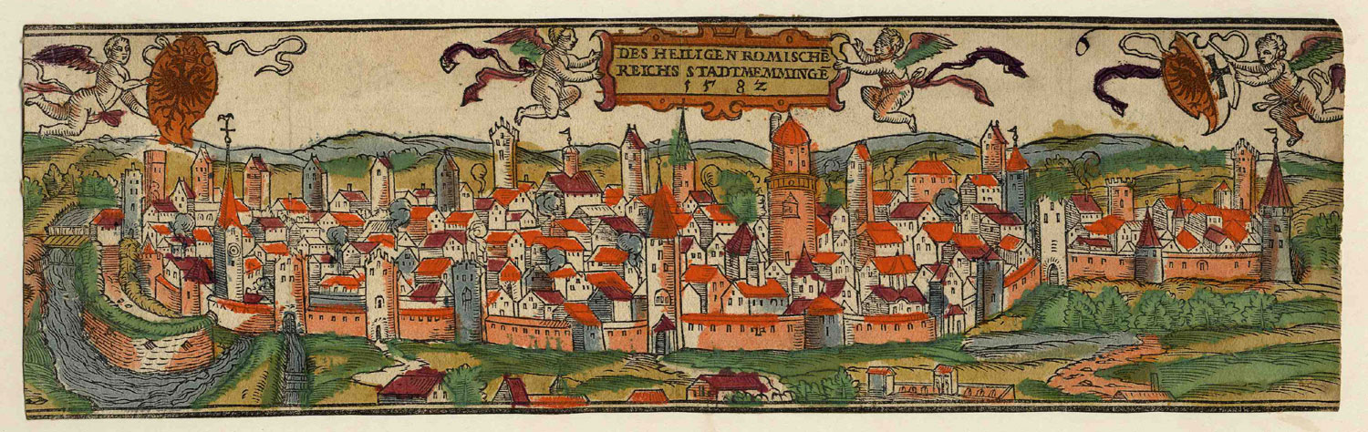 Ansicht von Memmingen; Holzschnitt (koloriert), 1582